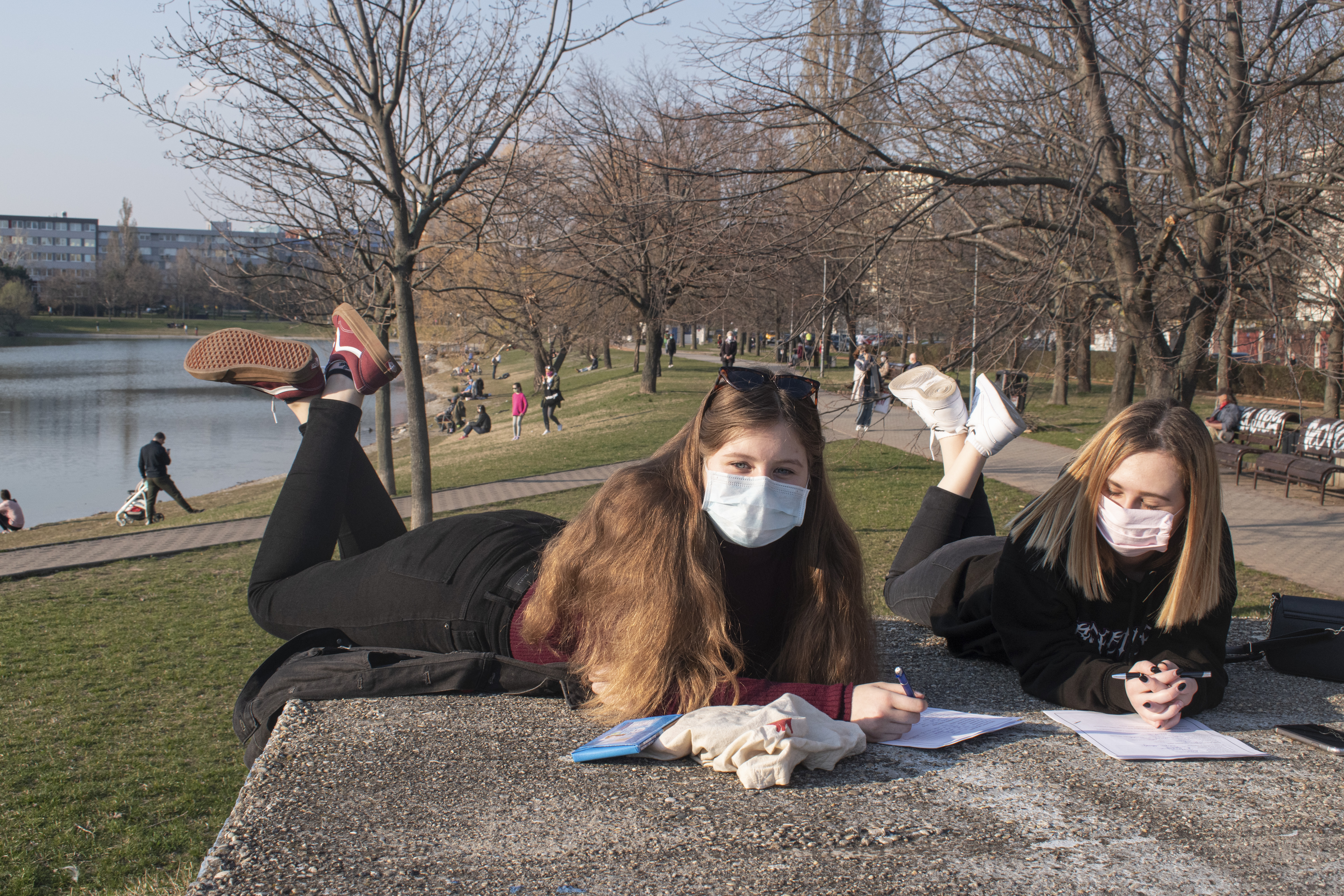 Koronavírus - Bratislavský samosprávny kraj